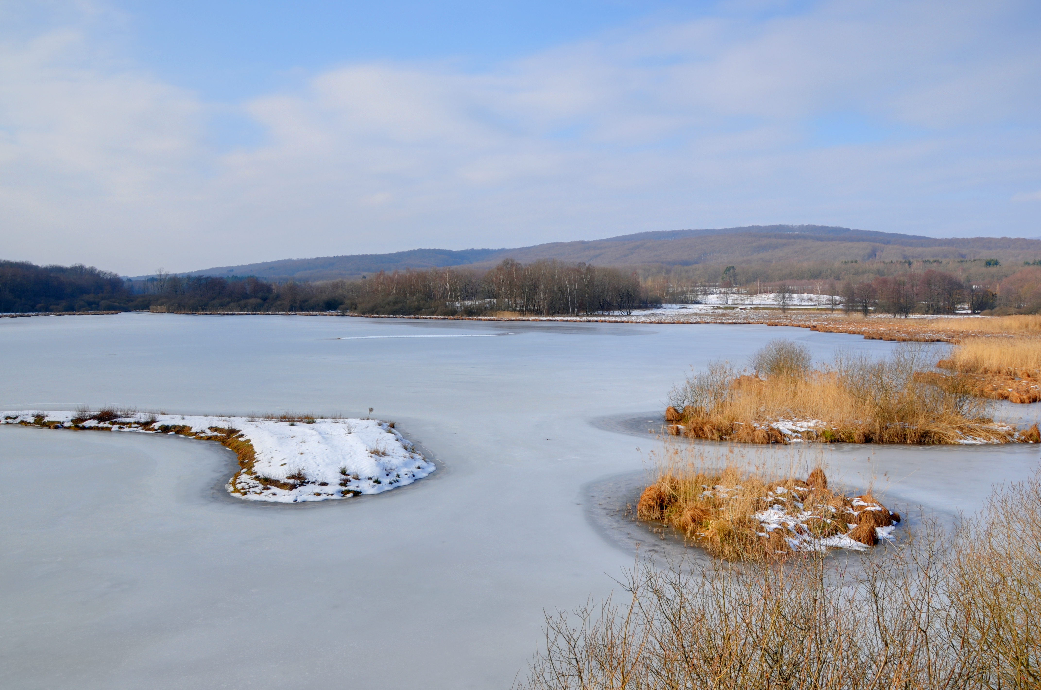 Vue du lac depuis l'observatoire à oiseaux (HDR).